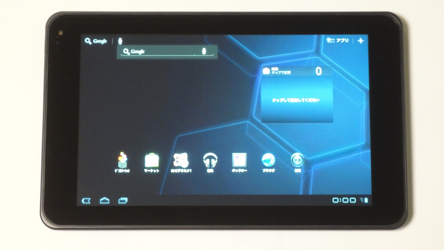 NTTドコモの第3世代移動通信システム（FOMA）対応タブレット、「Optimus Pad L-06C」の画面側の写真です。平成23(2011)年12月3日撮影。